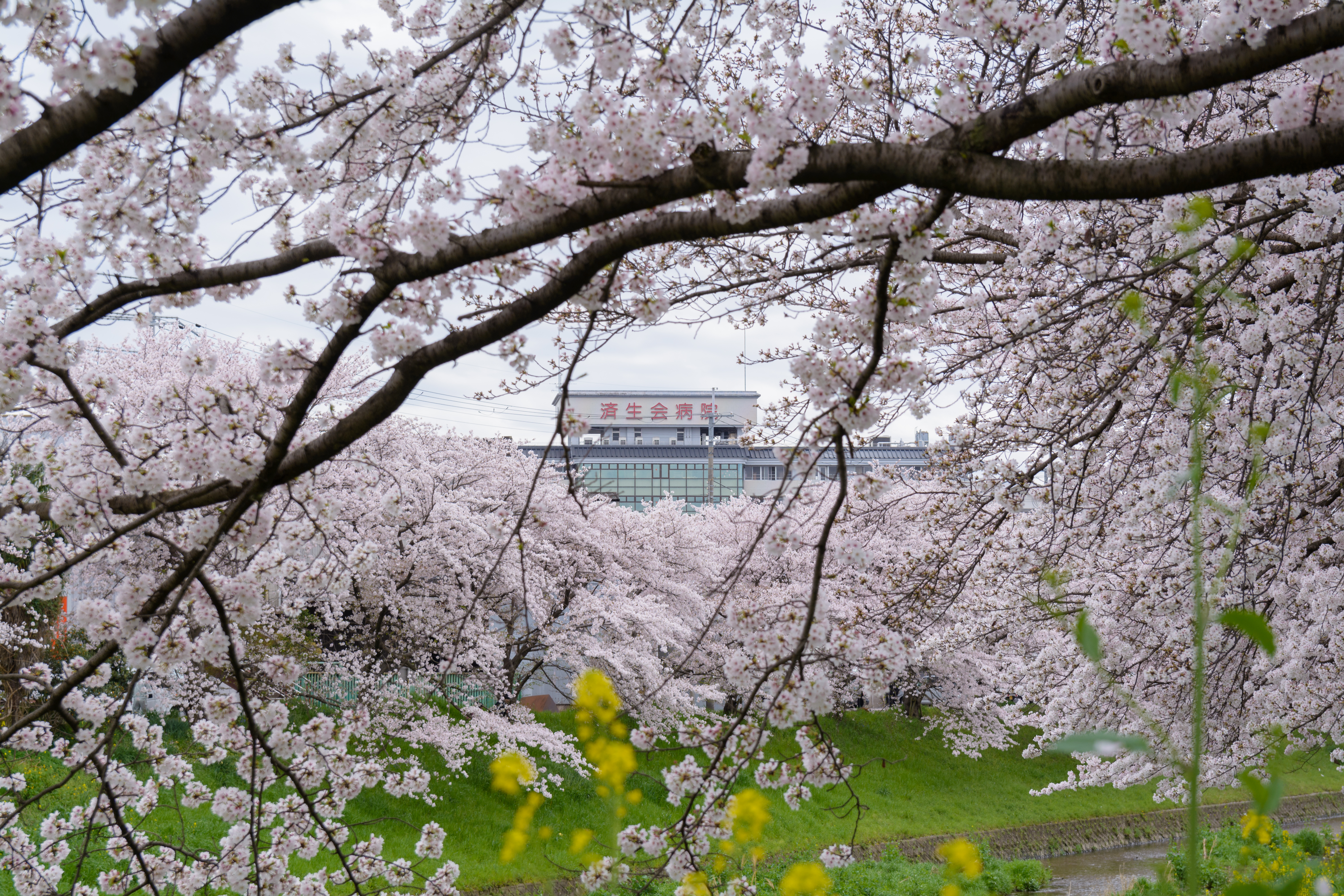 済生会奈良病院（奈良市八条4丁目）